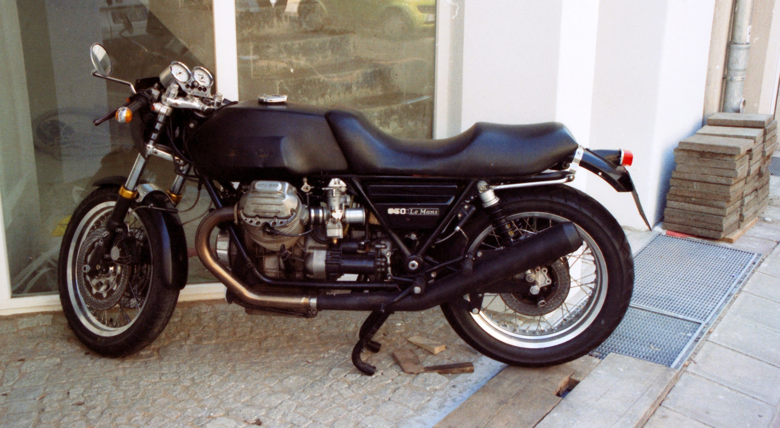 Moto Guzzi V850 Le Mans Modified motorcycle.